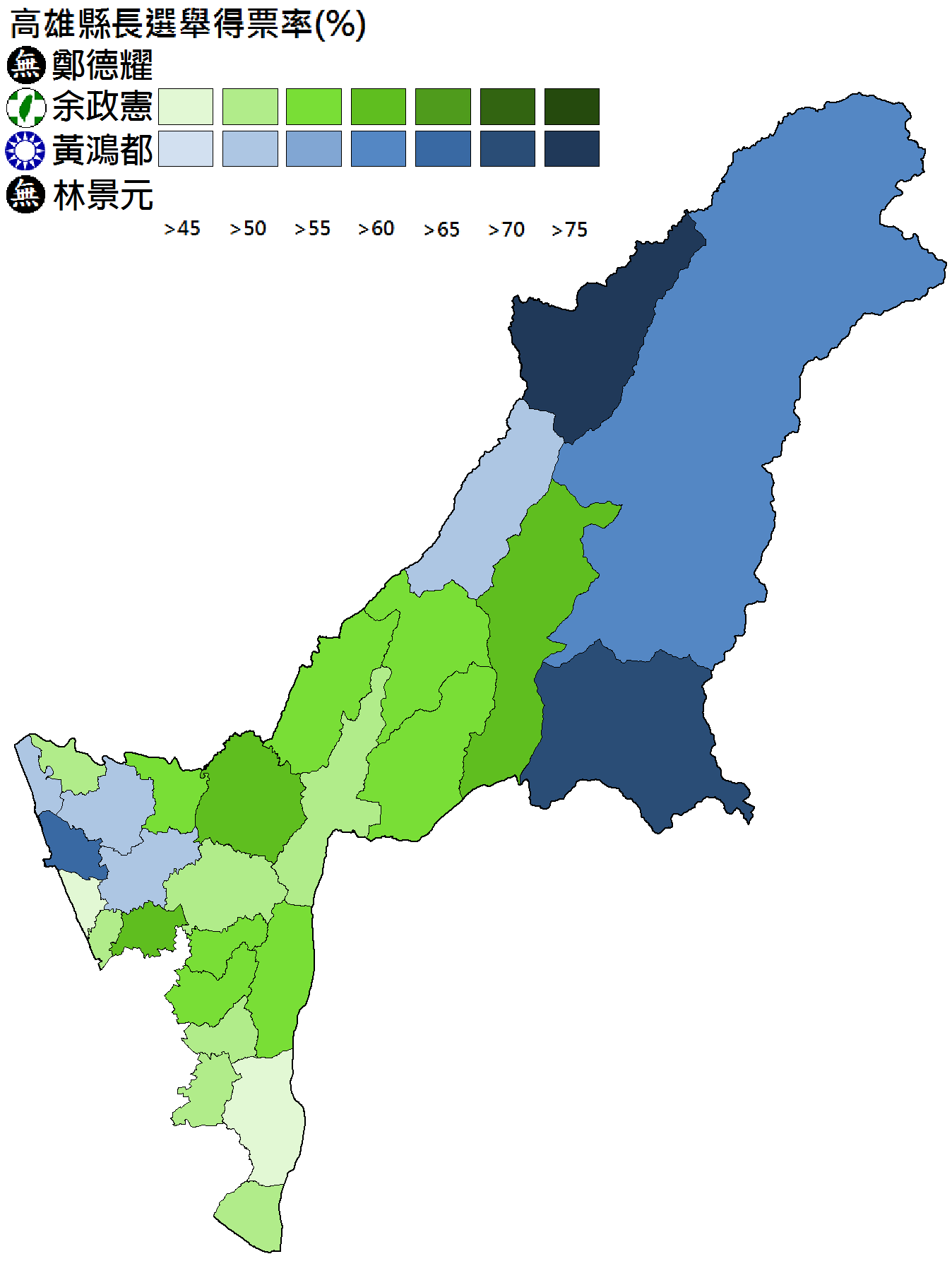 1997年高雄縣長選舉